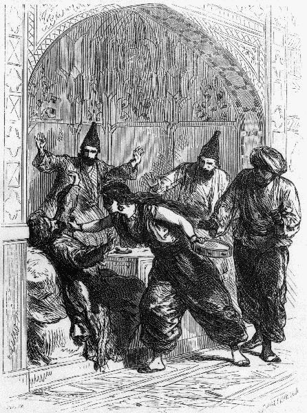 Scene from "Histoire d'Ali-Baba et de quarante voleurs exterminés par une esclave"